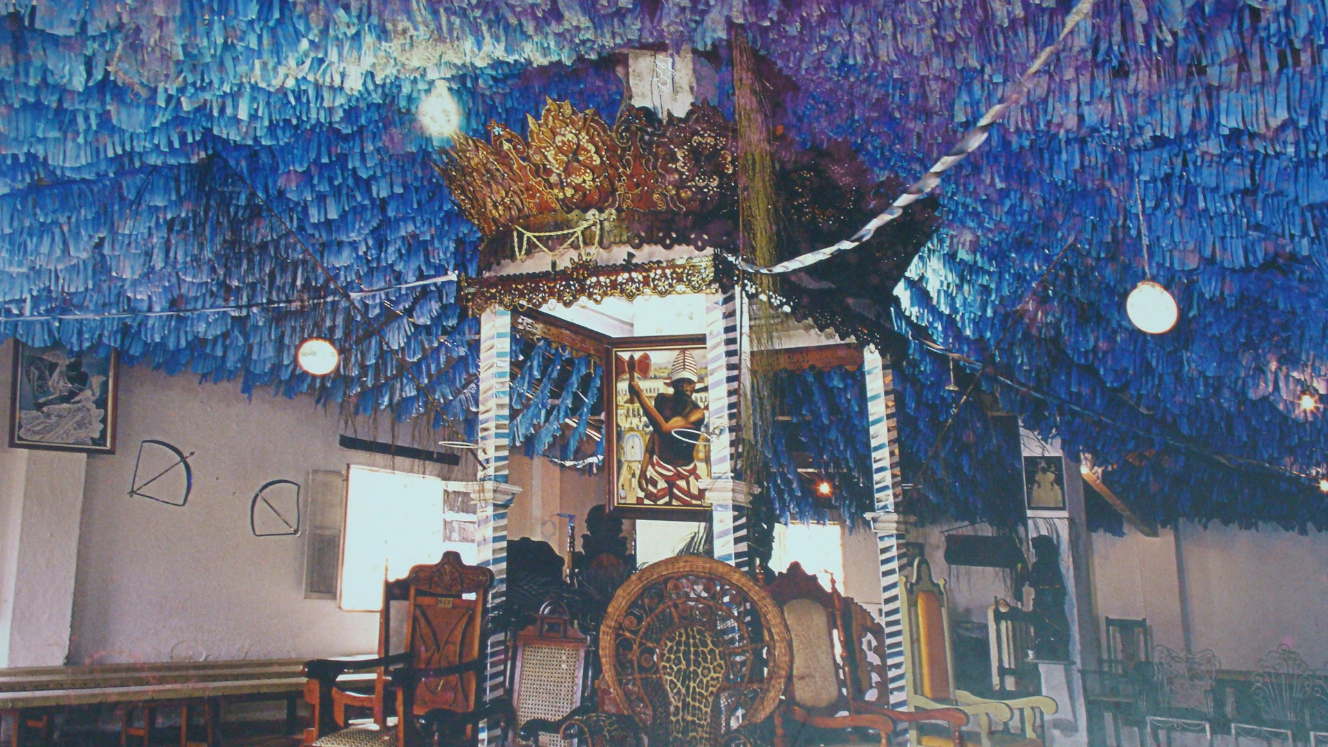 Terreiro de Candomblé Ilé Axé Iya Nassô Oká Casa Branca, Bahia